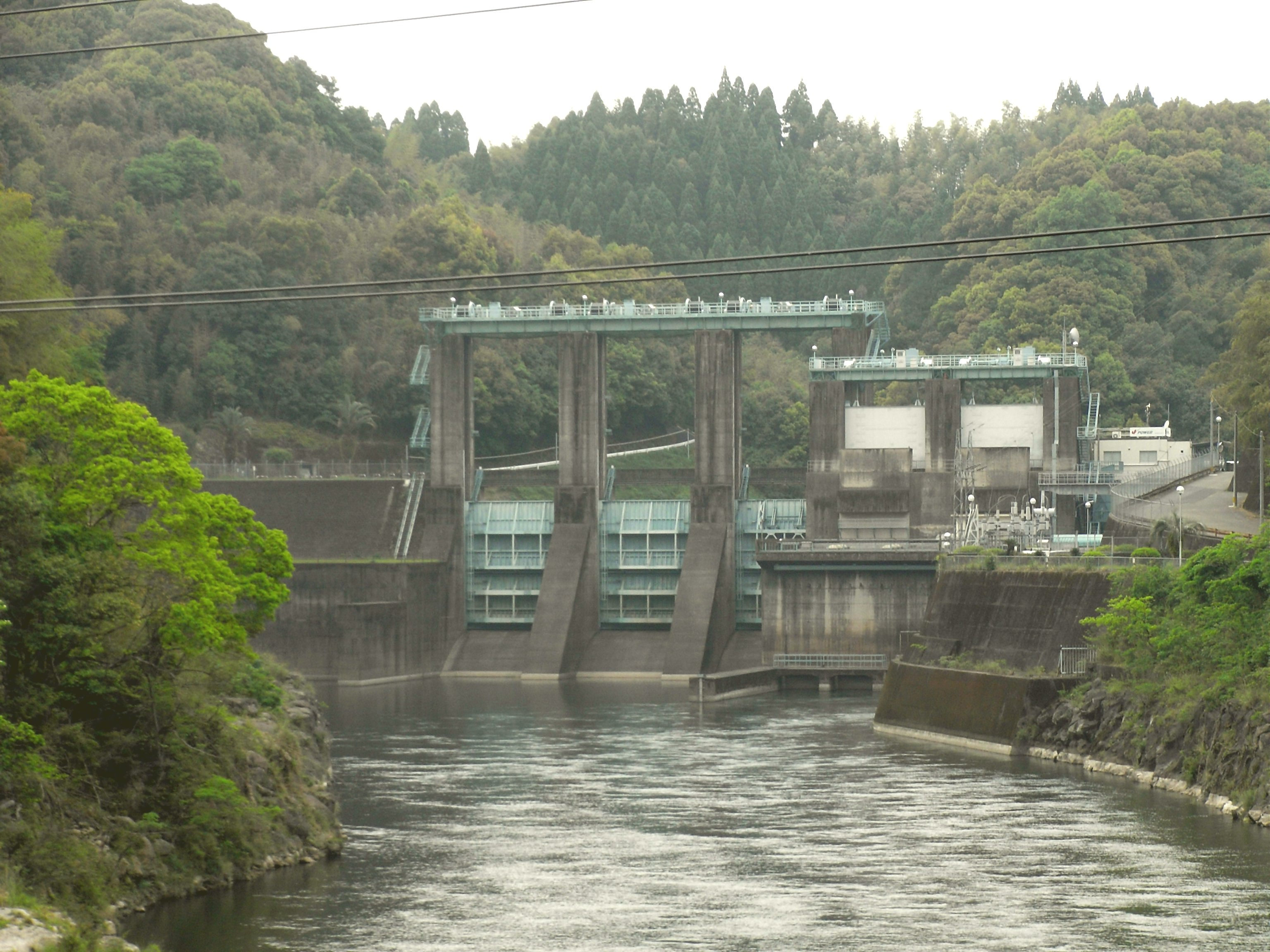 Dam